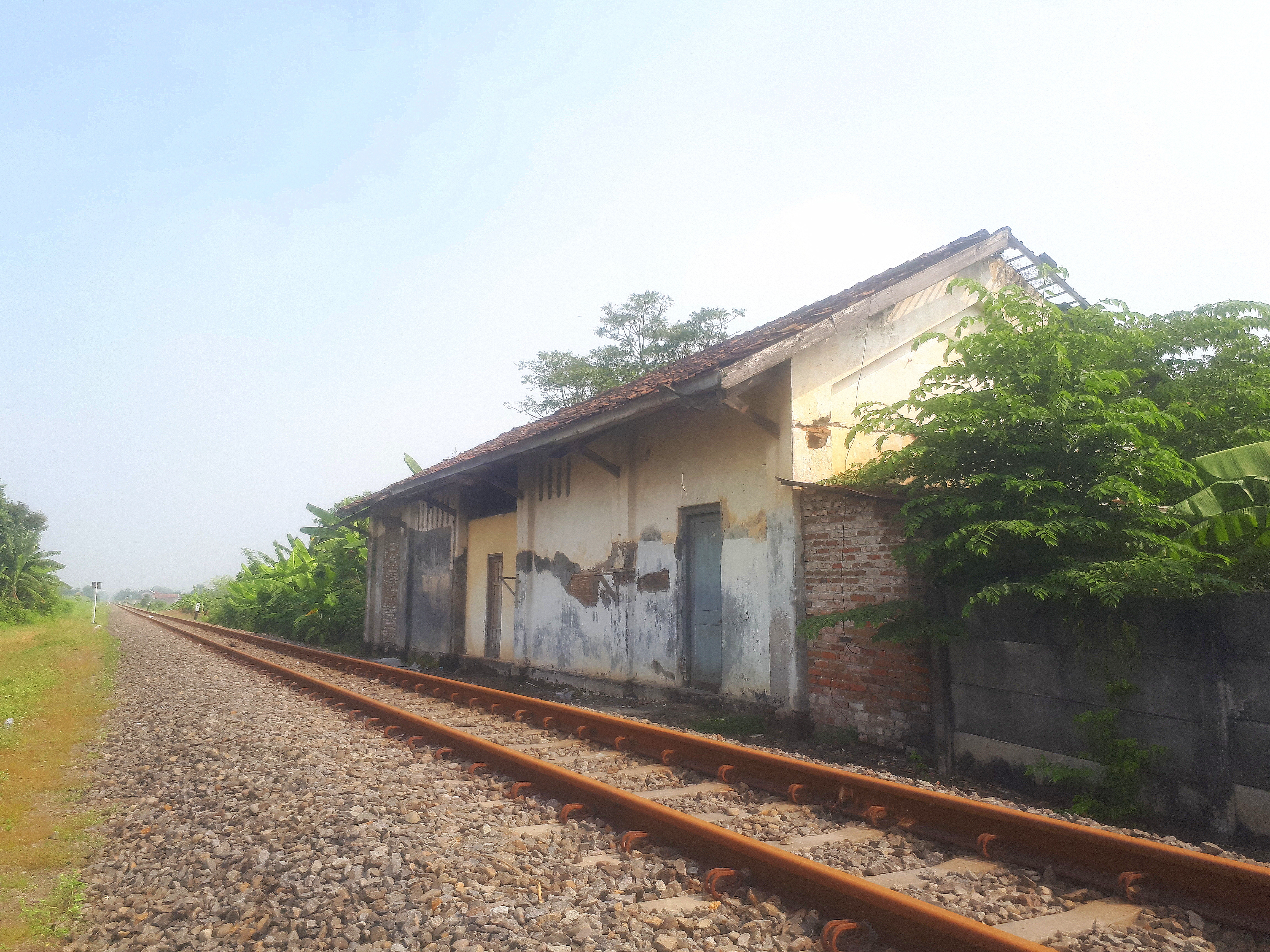 Bangunan utama Stasiun Prambon, 2020